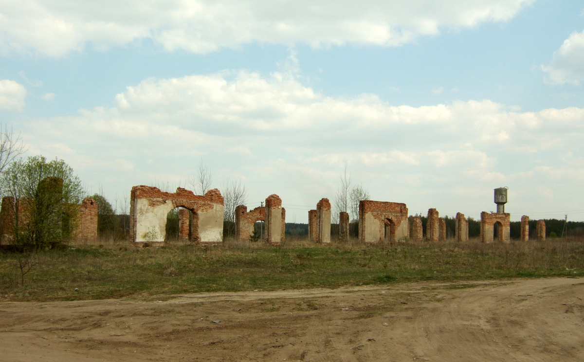 Raudondvario (Nemenčinė) dvaro sodybos daržinės griuvėsiai